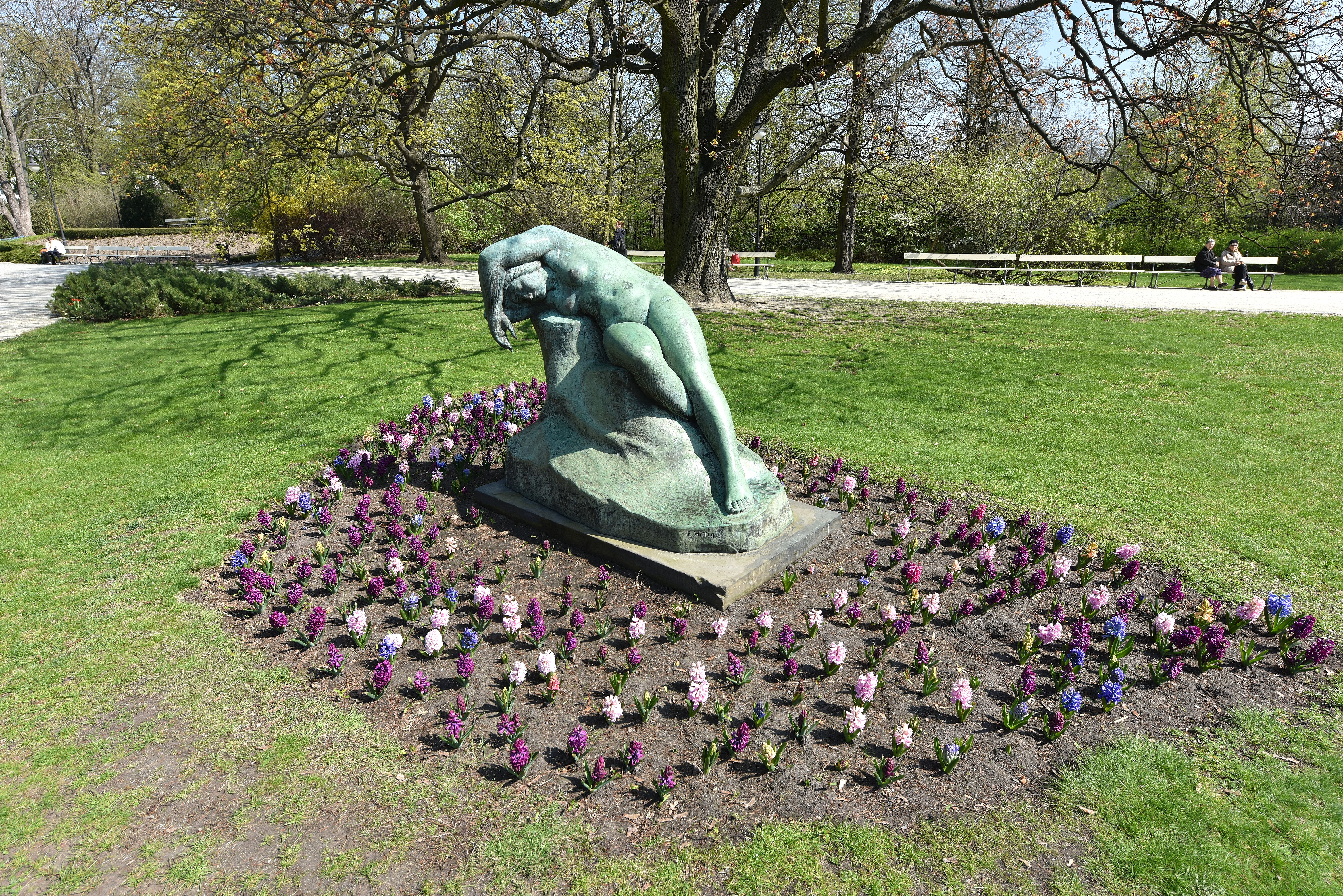 Rzeźba Ewa Edwarda Wittiga w parku Ujazdowskim w Warszawie